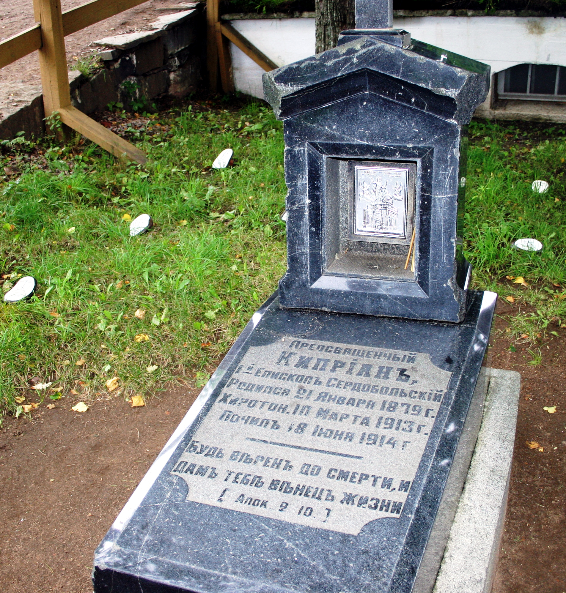 Piispa Kiprianin hauta Laatokan Valamossa